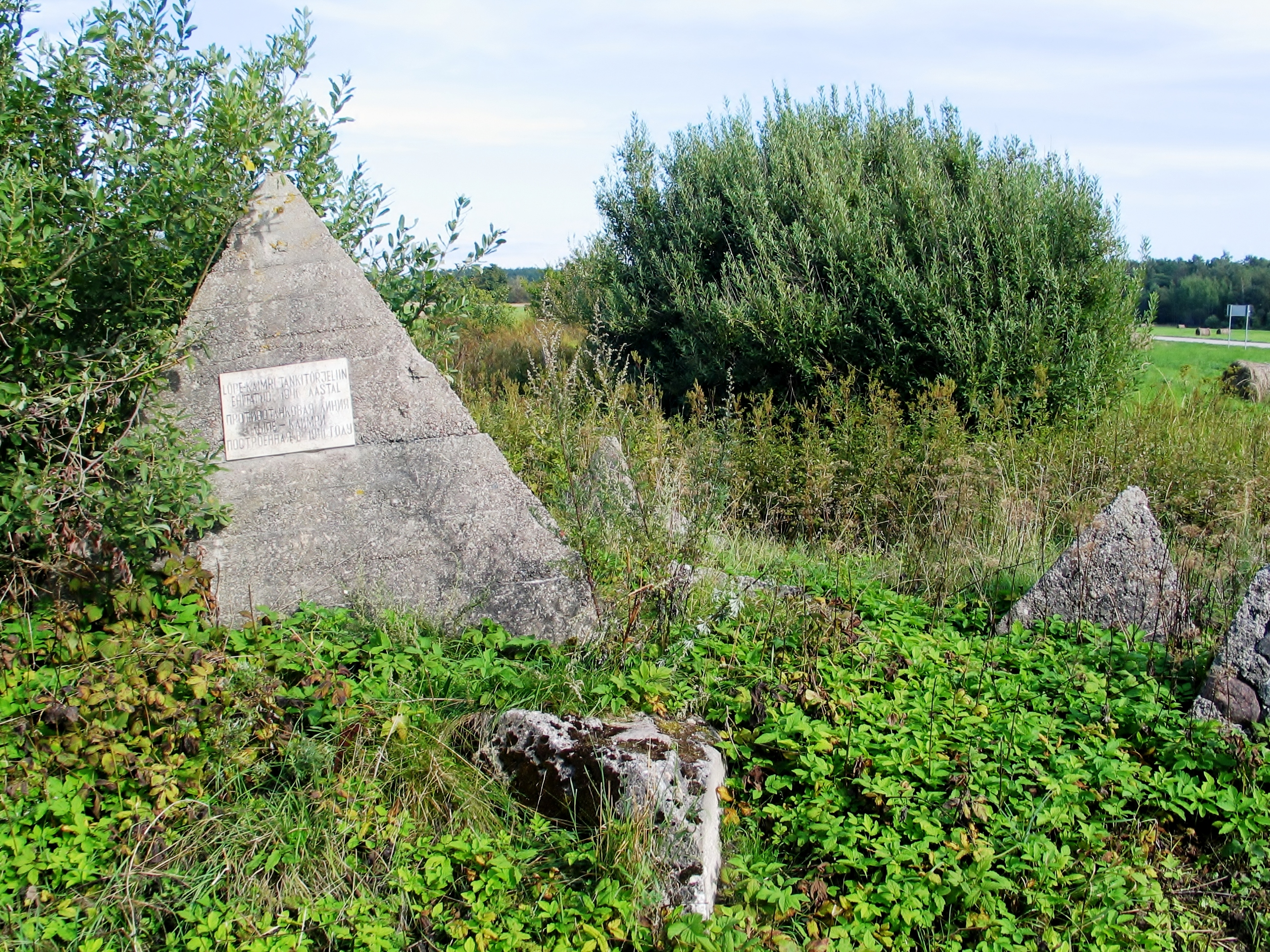 Lõpe-Kaimri tankitõrjeliinile 1969 püstitatud mälestusmärk